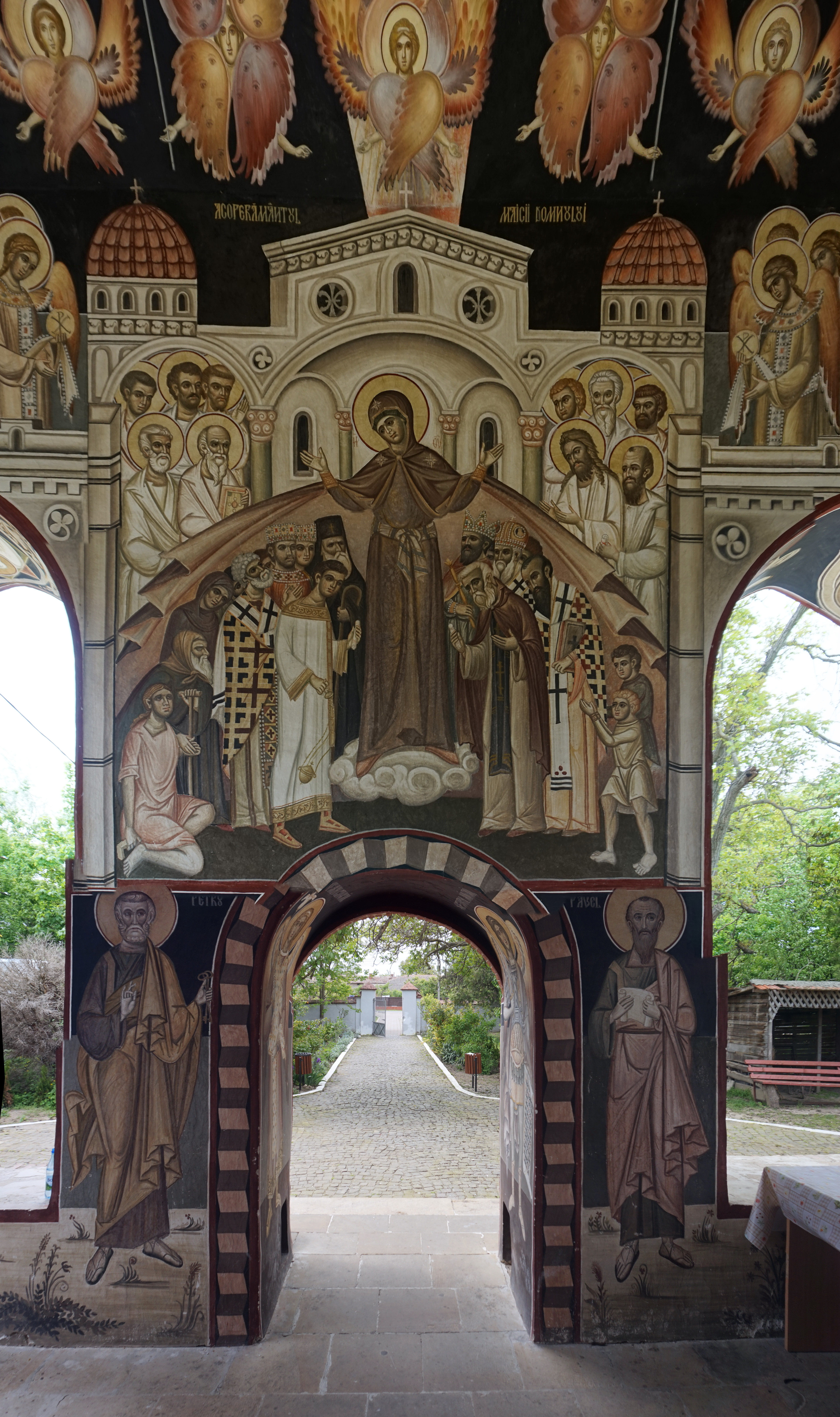 Biserica „Sf. Treime” din Herăști, cod LMI GR-II-m-A-15013.02. ieșire din pridvor 02